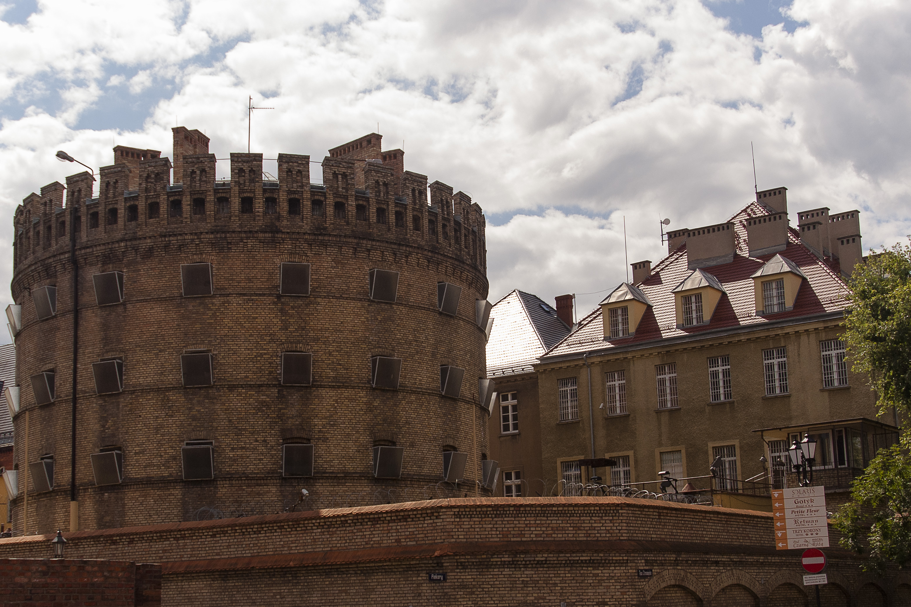 Budynek aresztu, widok od strony ul. Piekary